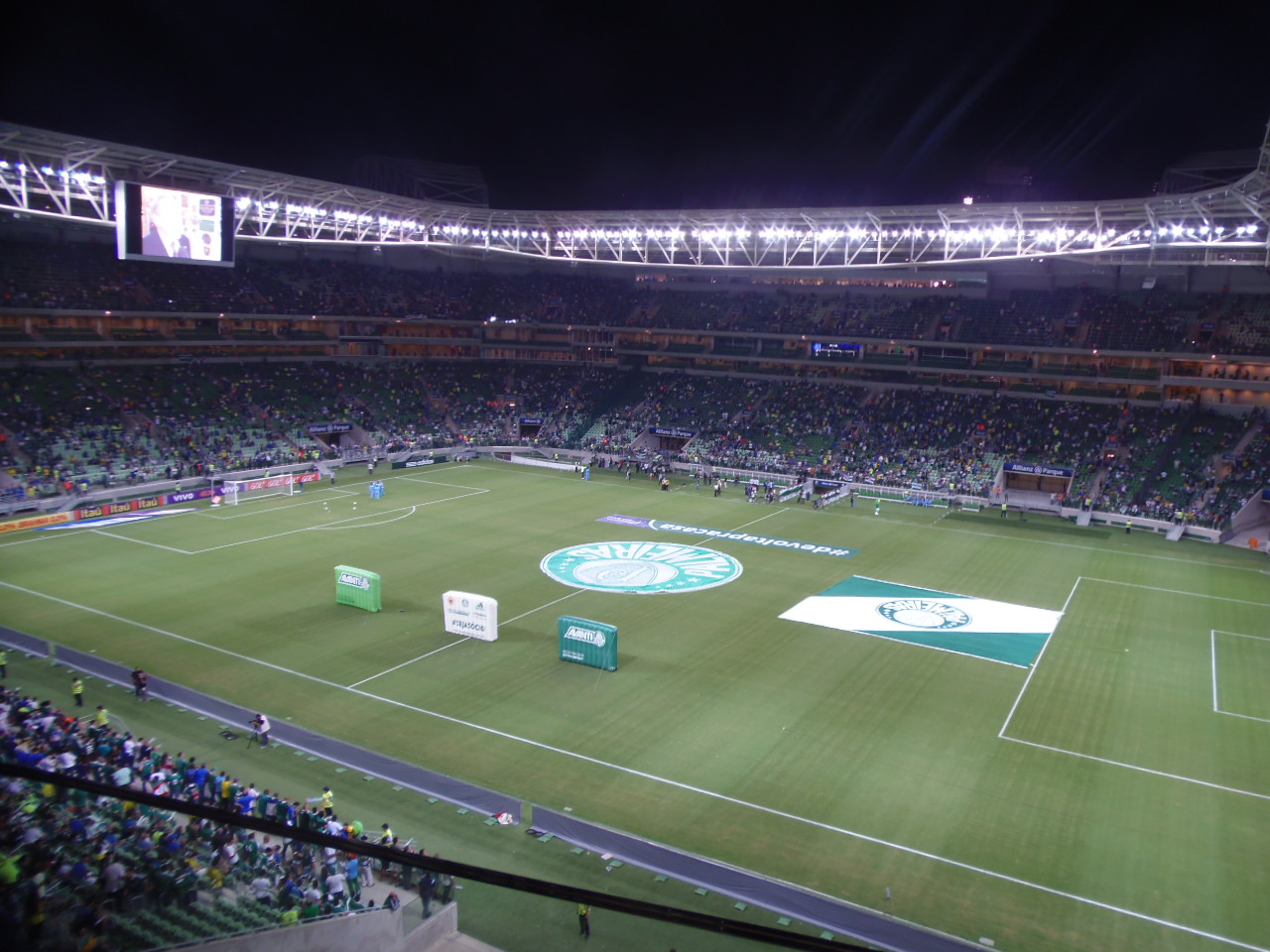 Allianz Parque - Inauguração da nova Arena do Palmeiras